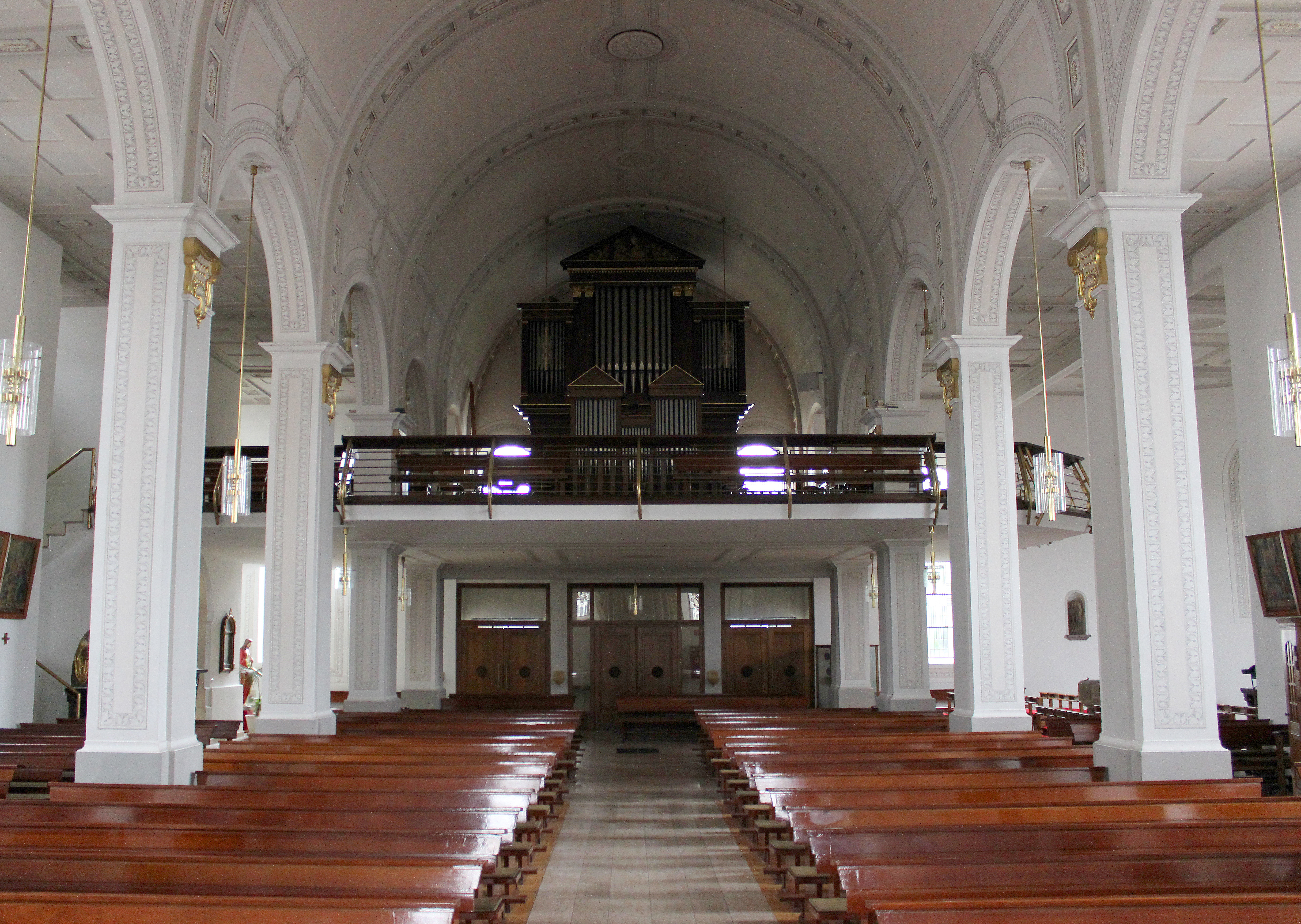 Blick ins Innere der katholischen Pfarrkirche St. Sebastian in Eppelborn, Landkreis Neunkirchen, Saarland